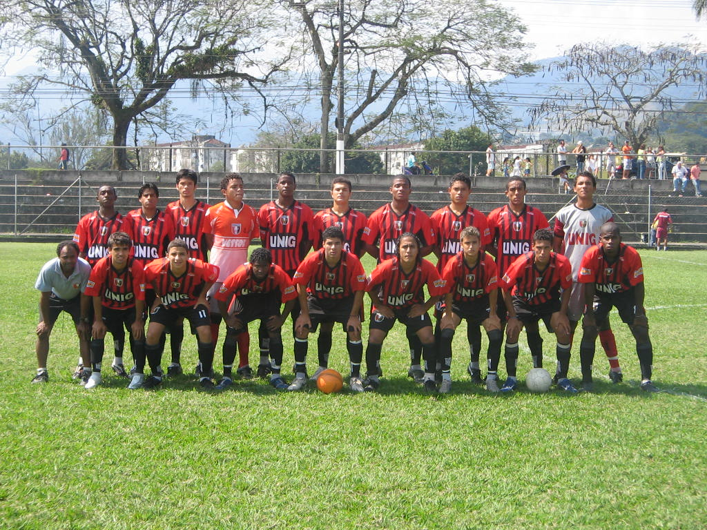 Equipe juvenil do Itaperuna, em 2007. Foto de Paulo Roberto Rodrigues.